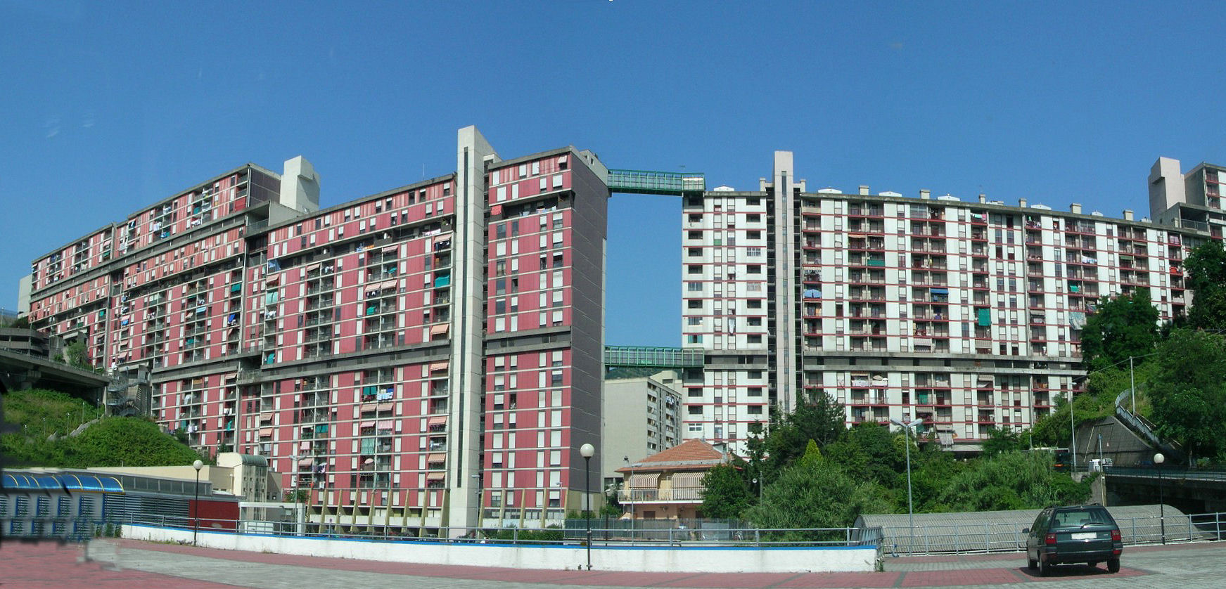 Genova-Rivarolo, veduta della "Diga" di Begato